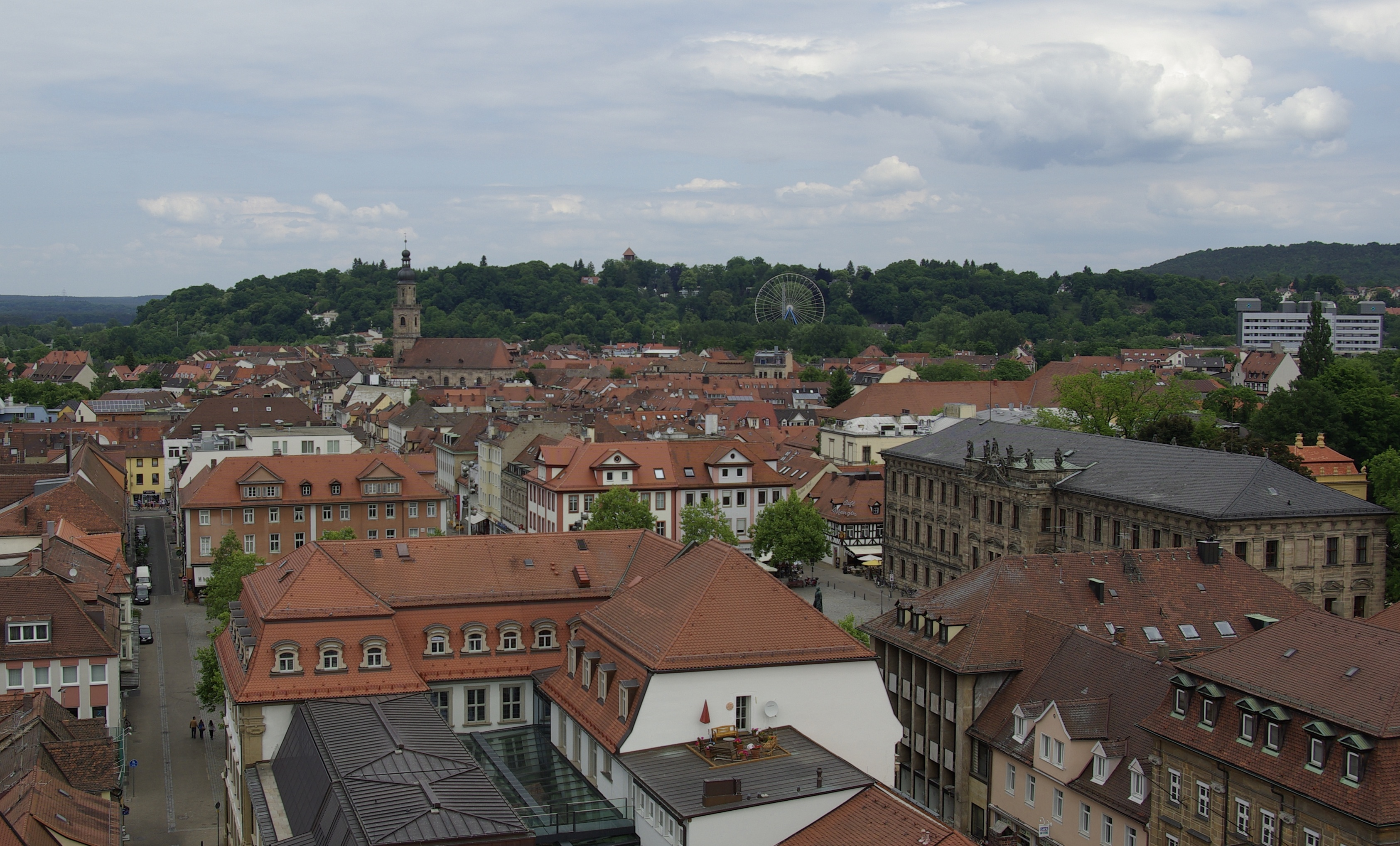 Erlangen. Blick vom Turm der Hugenottenkirche zum Burgberg.